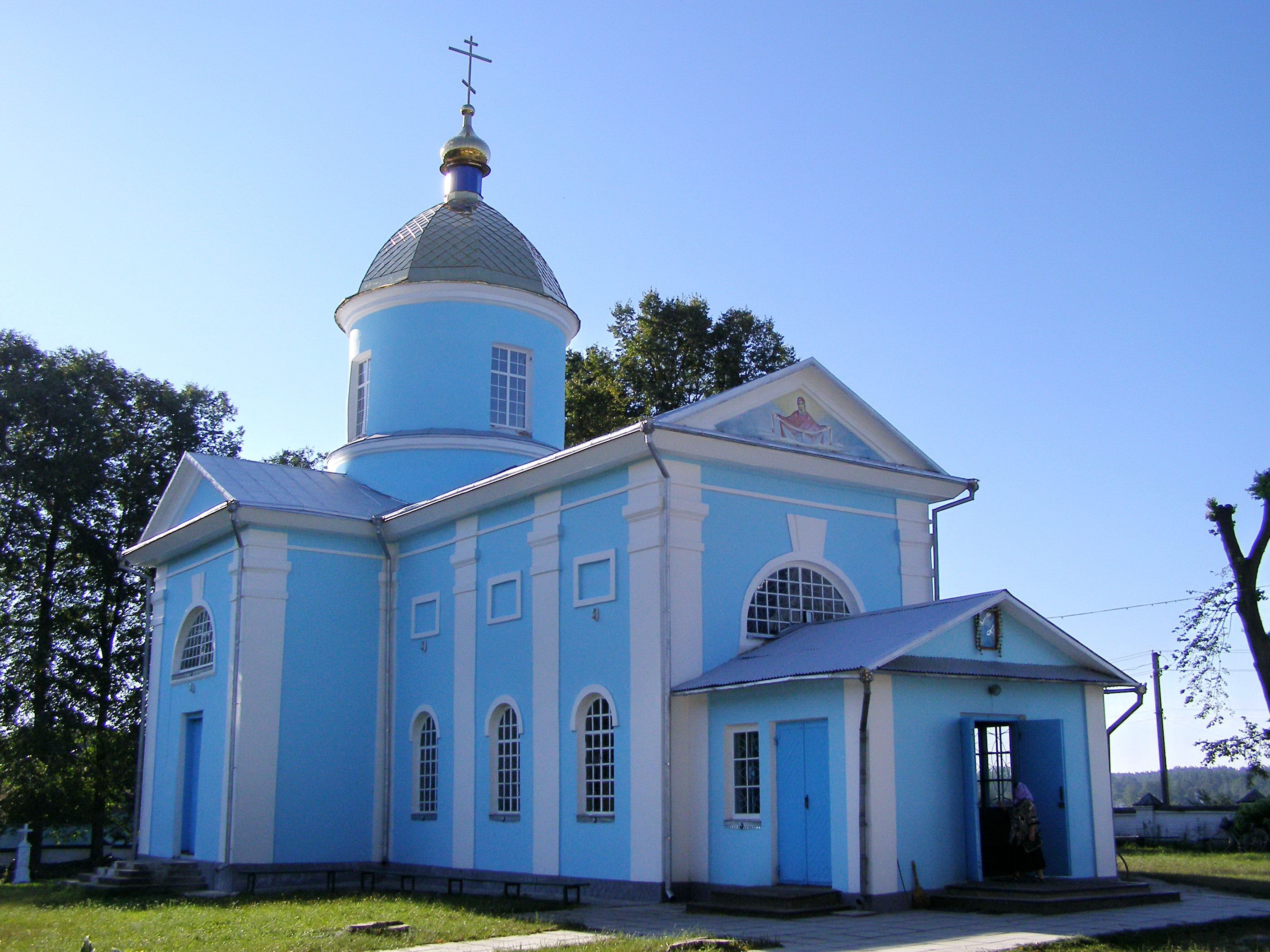 Покровська церква (мур.), Цумань